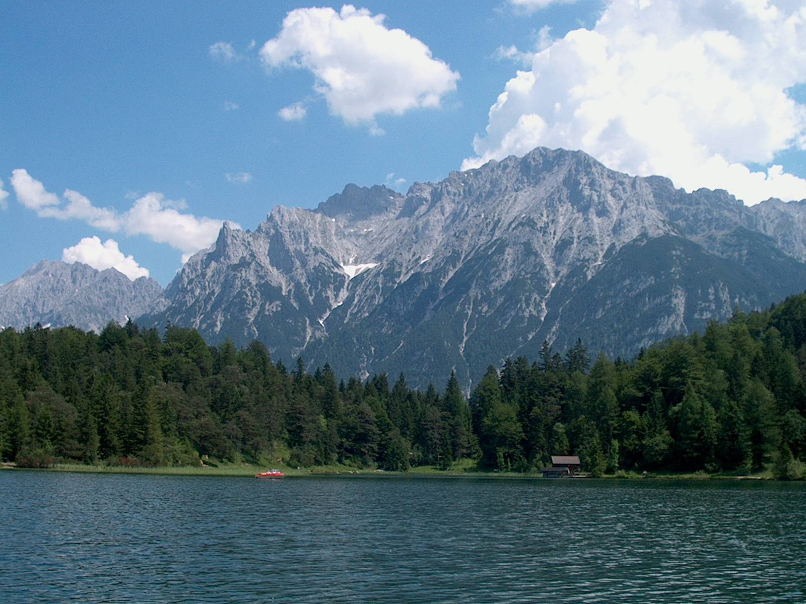 Karwendel in Richtung Osten vom Lautersee bei Mittenwald aus gesehen * Sonstiges: ...